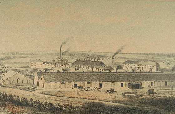 Zinkhütte in Eschweiler-Birkengang 2. Hälfte des 19. Jh. - eingescannt von Postkarte in Privatbesitz